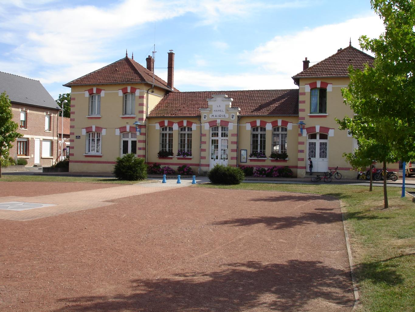 Mairie du village - Le Hamel, Somme (France)